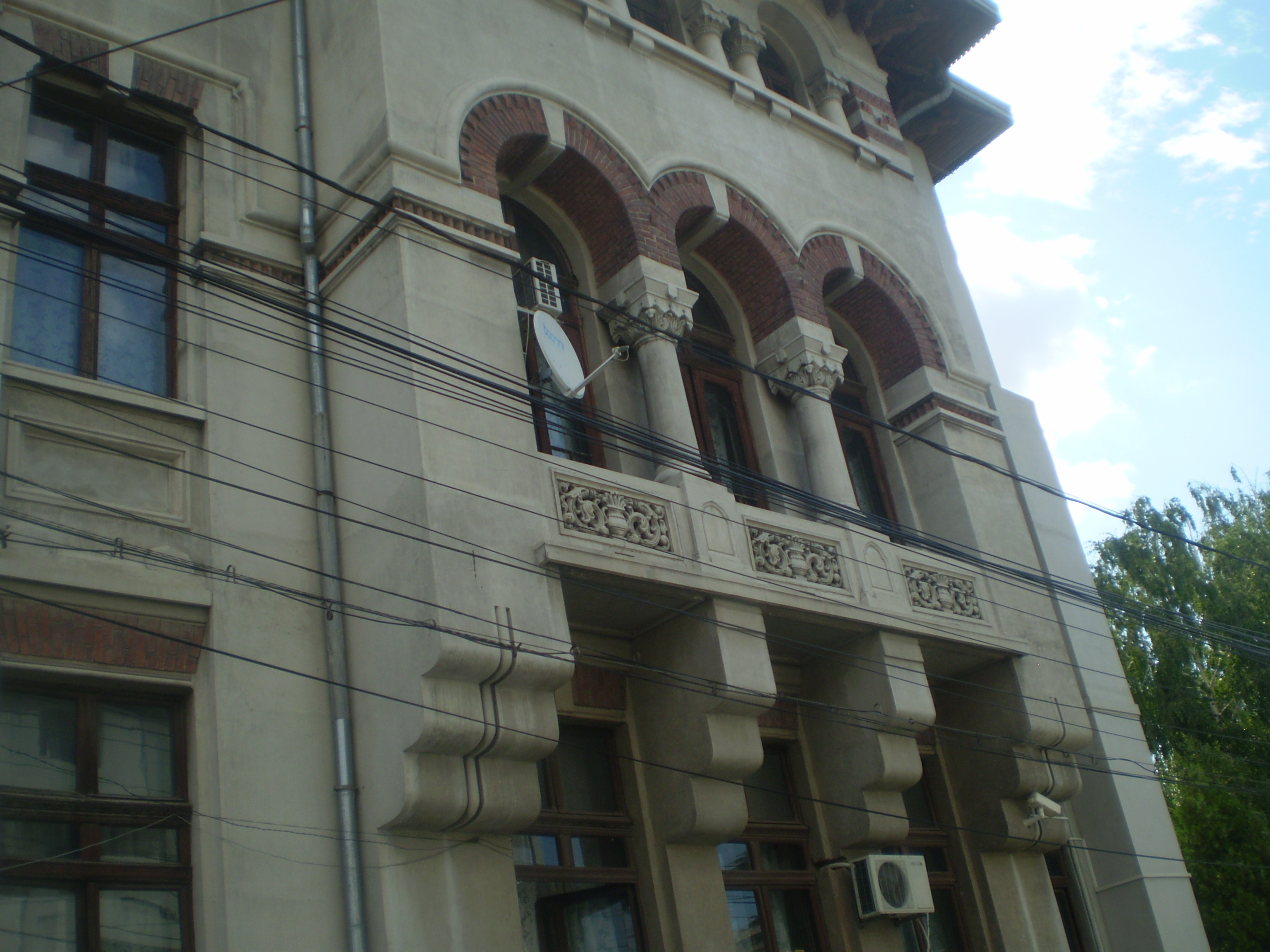 Un colegiu de tradiţie într-o clădire din patrimoniul UNESCO: Colegiul Ion Luca Caragiale din Ploieşti